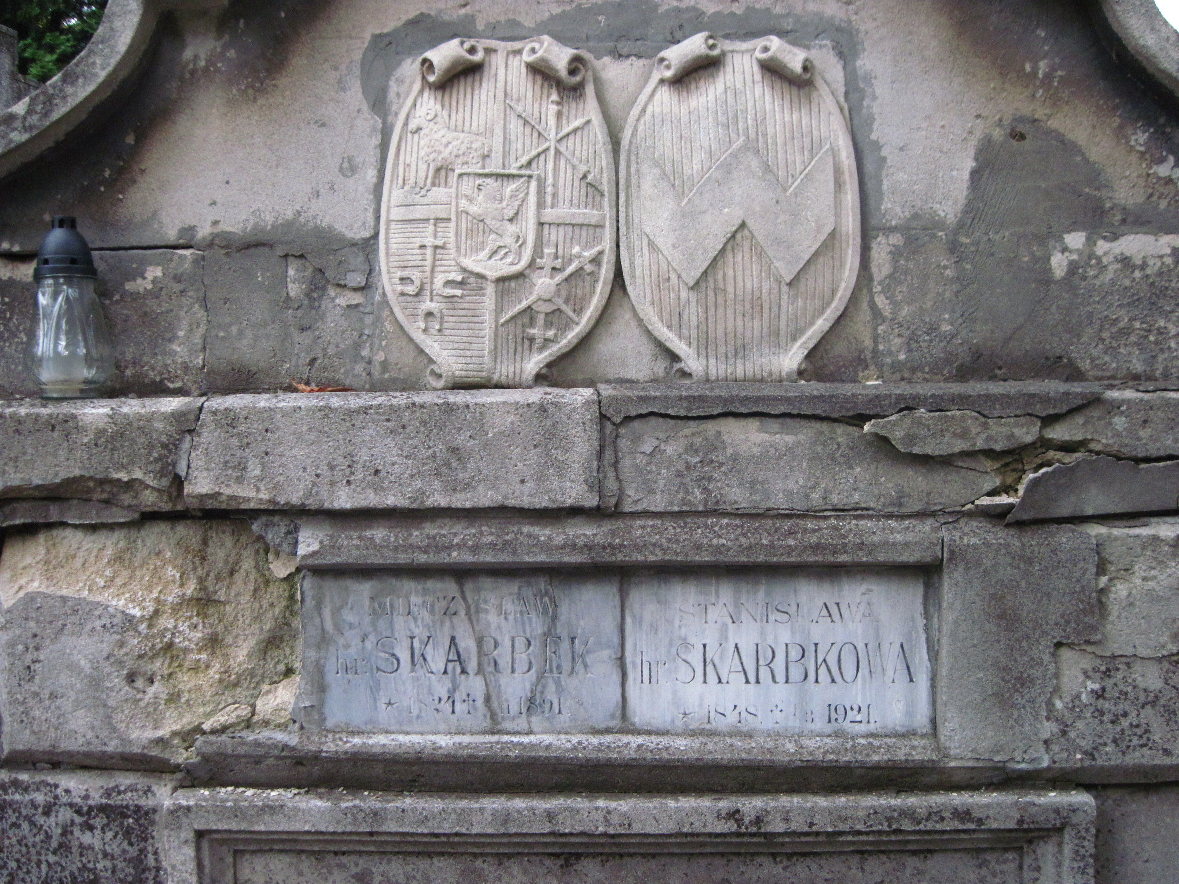 Герби надгробка предст. роду Скарбеків, Личаків